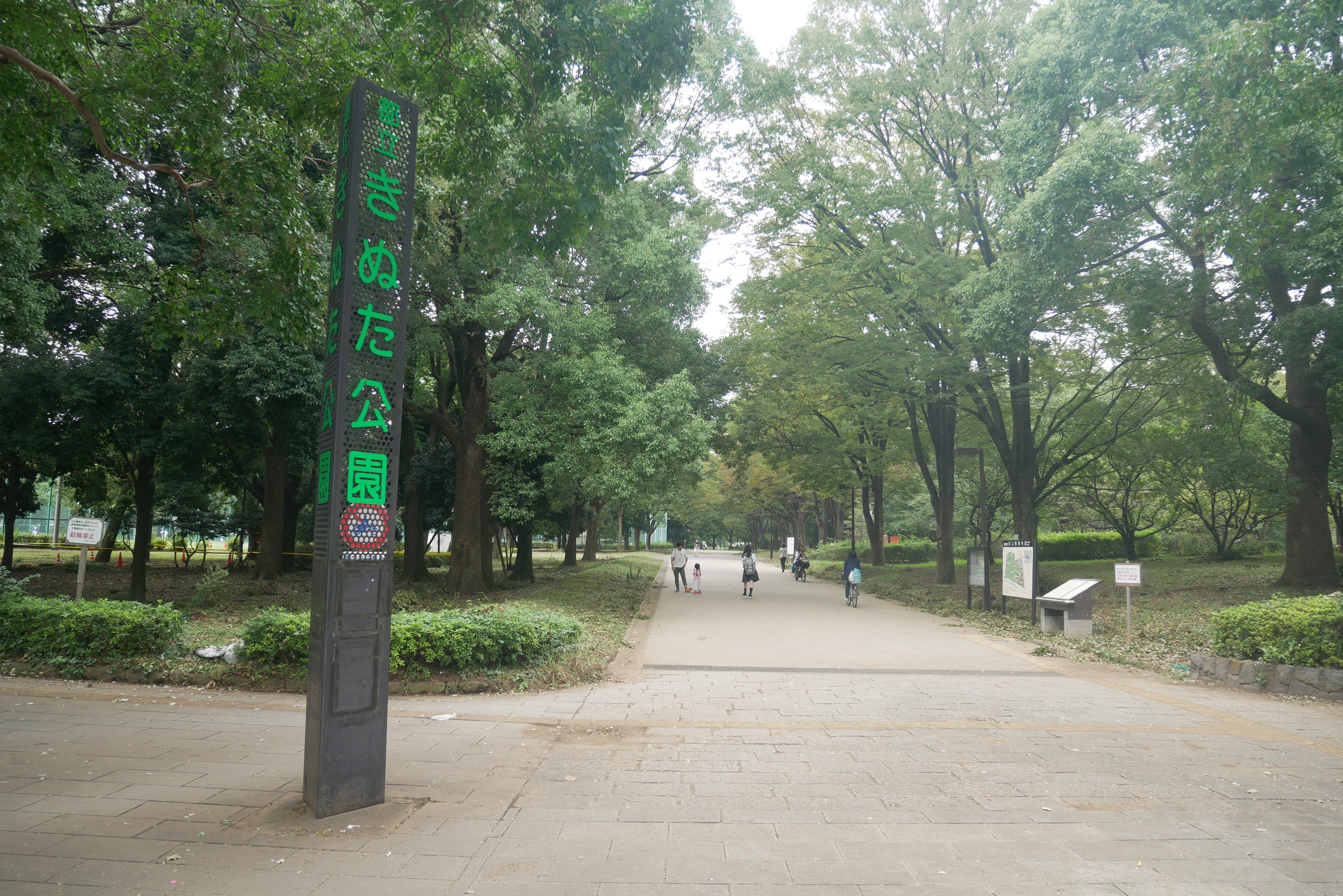 Kinuta Park (砧公園)